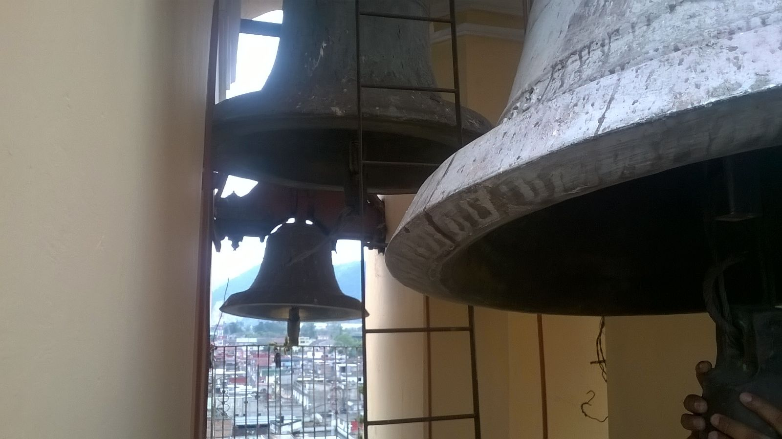 Vista desde el interior del campanario, se aprecian 3 campanas.